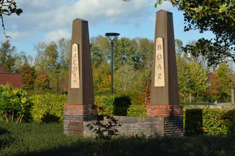 Jachin en Boazkerk, Genemuiden